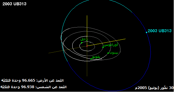 مدار الكوكب القزم 2003 UB313 يوم 30 تمُّوز (يوليو) 2005 (الناسا). تُظهر هذه الصورة مدارات الكواكب بِلونين: اللون الفاتح للقسم الذي يعلو مسار الشمس، واللون القاتم للقسم الذي يقع أسفله.